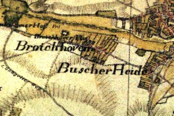 Kartenaufnahme der Rheinlande 1804/05